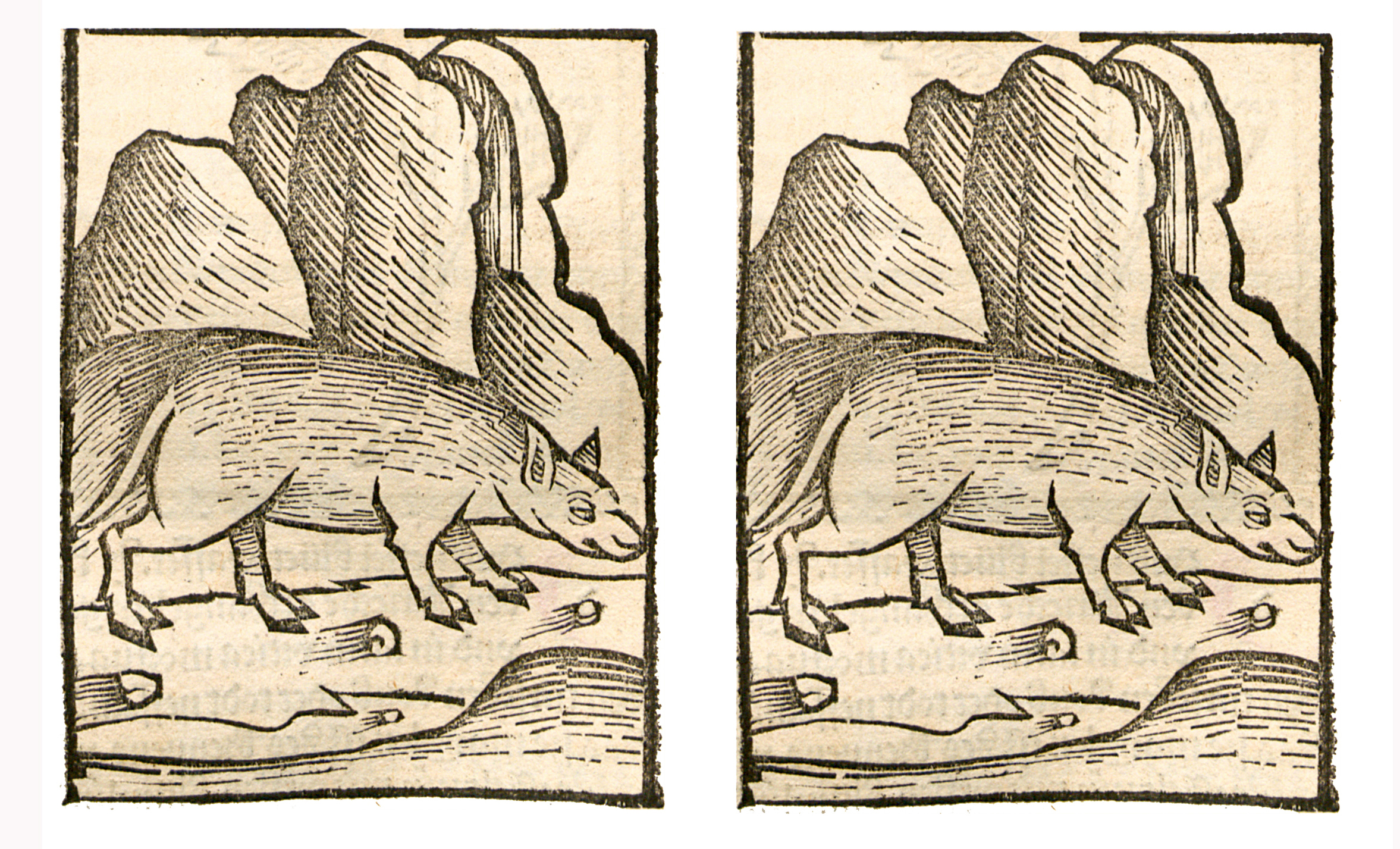 Abbildung von: Dachsblut